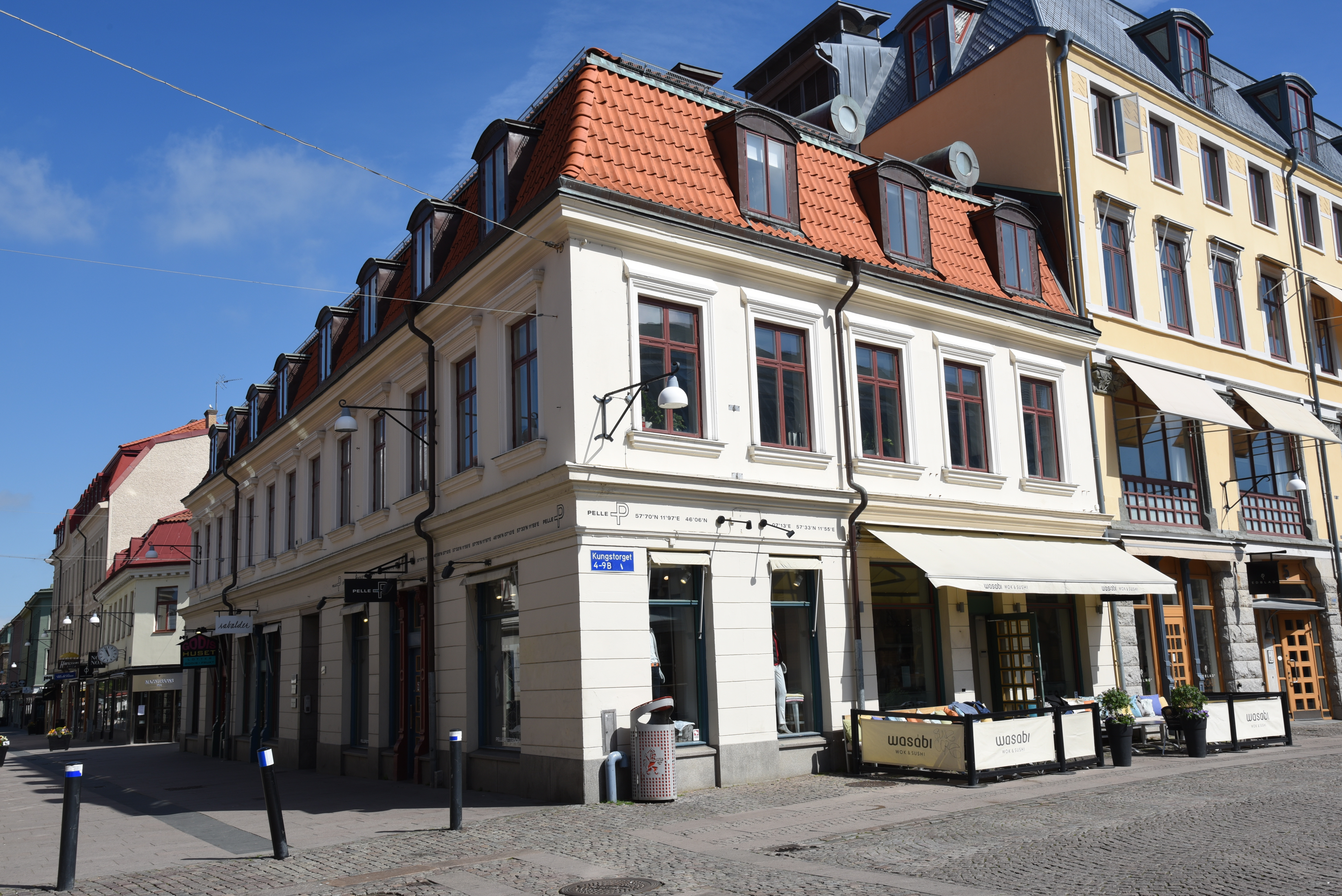 Korsgatan 24 - Kungstorget 4 i kvarteret Idogheten i stadsdelen Inom Vallgraven i Göteborg.